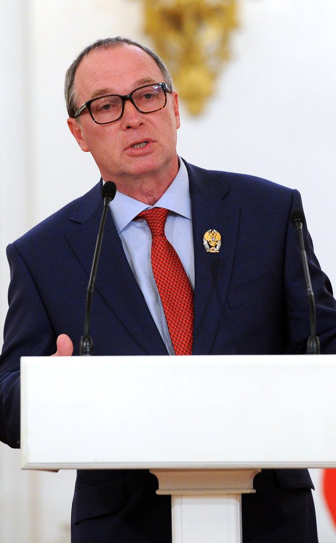 На церемонии вручения Государственных премий Российской Федерации. Сергей Урсуляк удостоен Государственной премии в области литературы и искусства